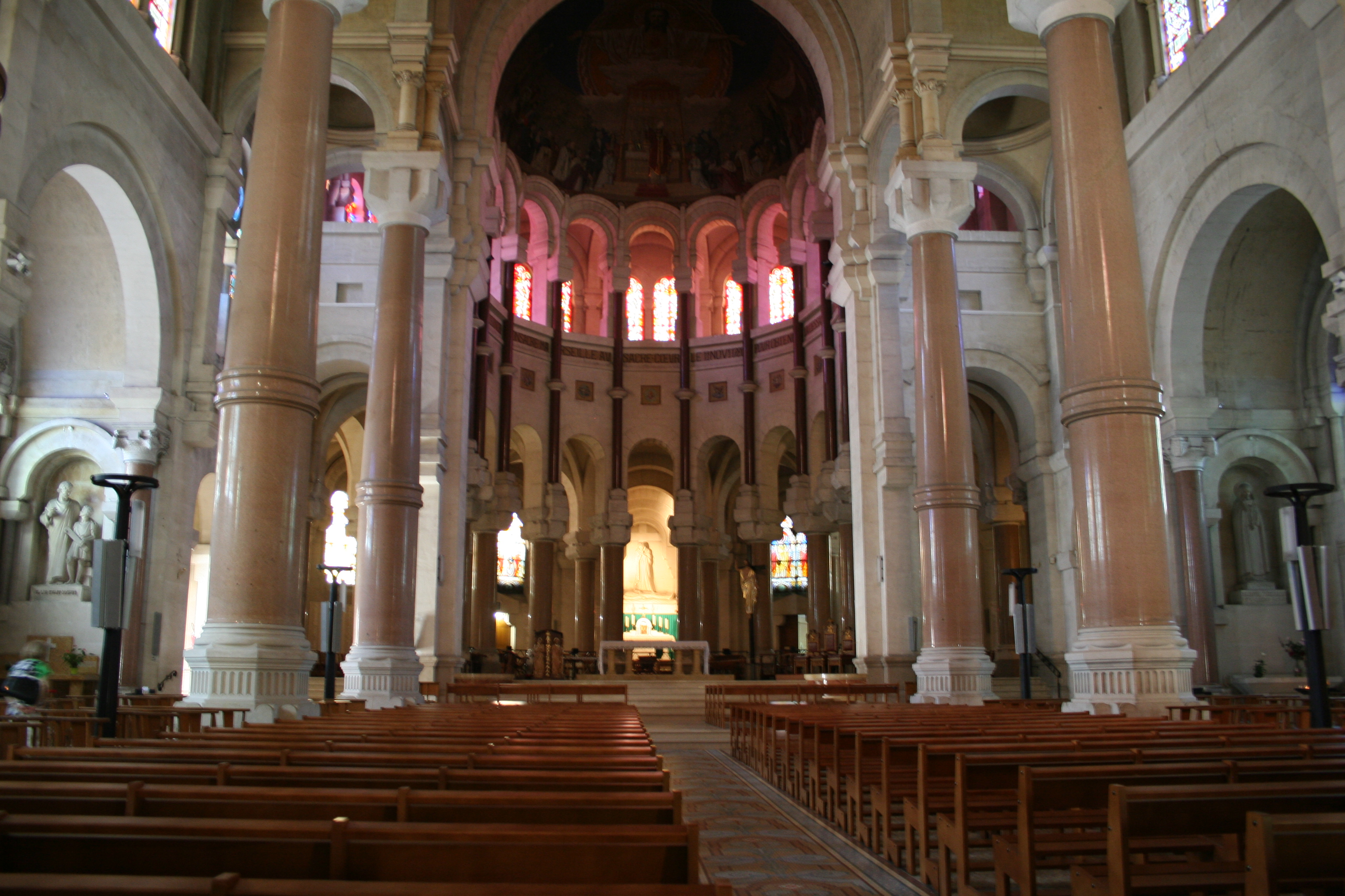 Intérieur de la basilique mineure du Sacré-Cœur à Marseille (France).